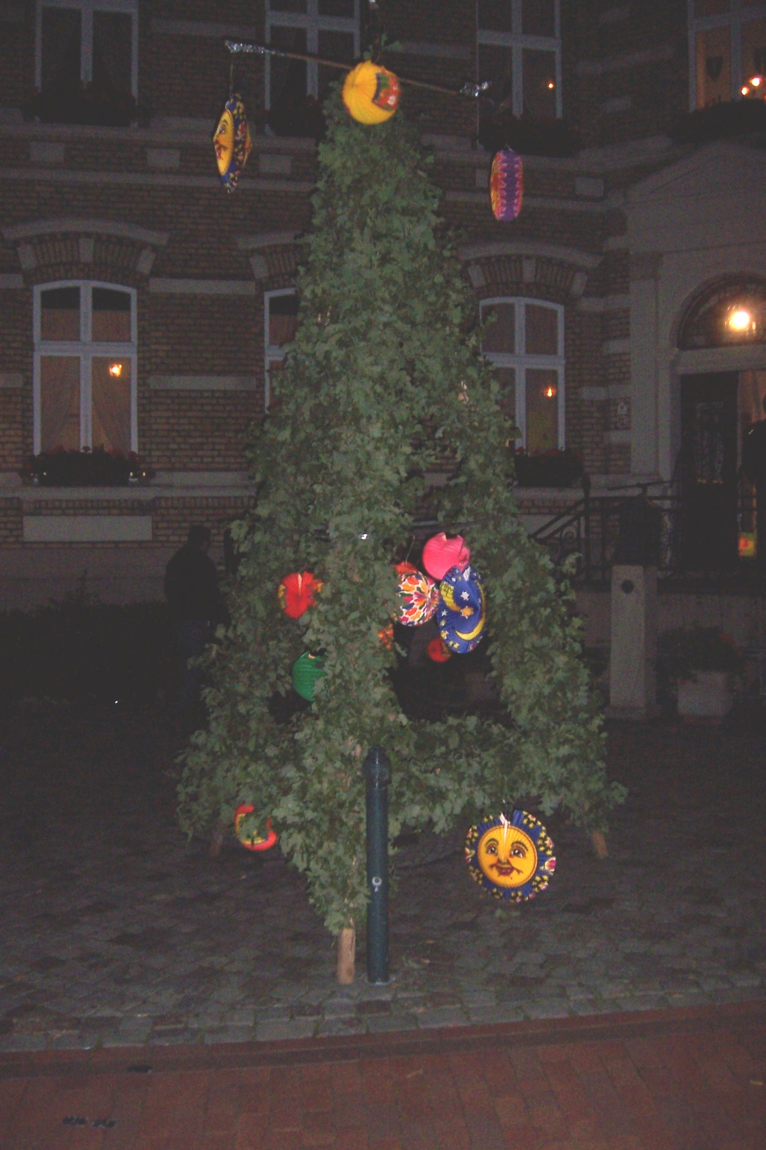 Lambertuspyramide Steinfurt-Borghorst, NRW, Germany.